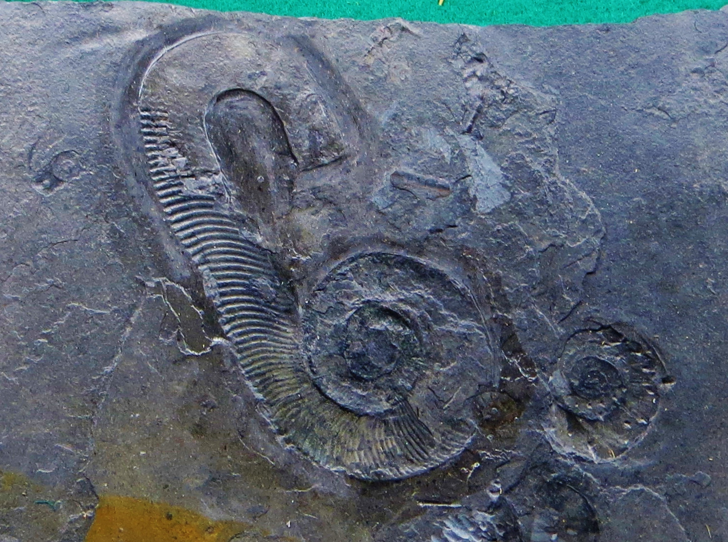 Fossil of Macroscaphites, an extinct mollusc- Took the picture at Museo di Storia naturale “Antonio Stoppani” - Venegono Inferiore